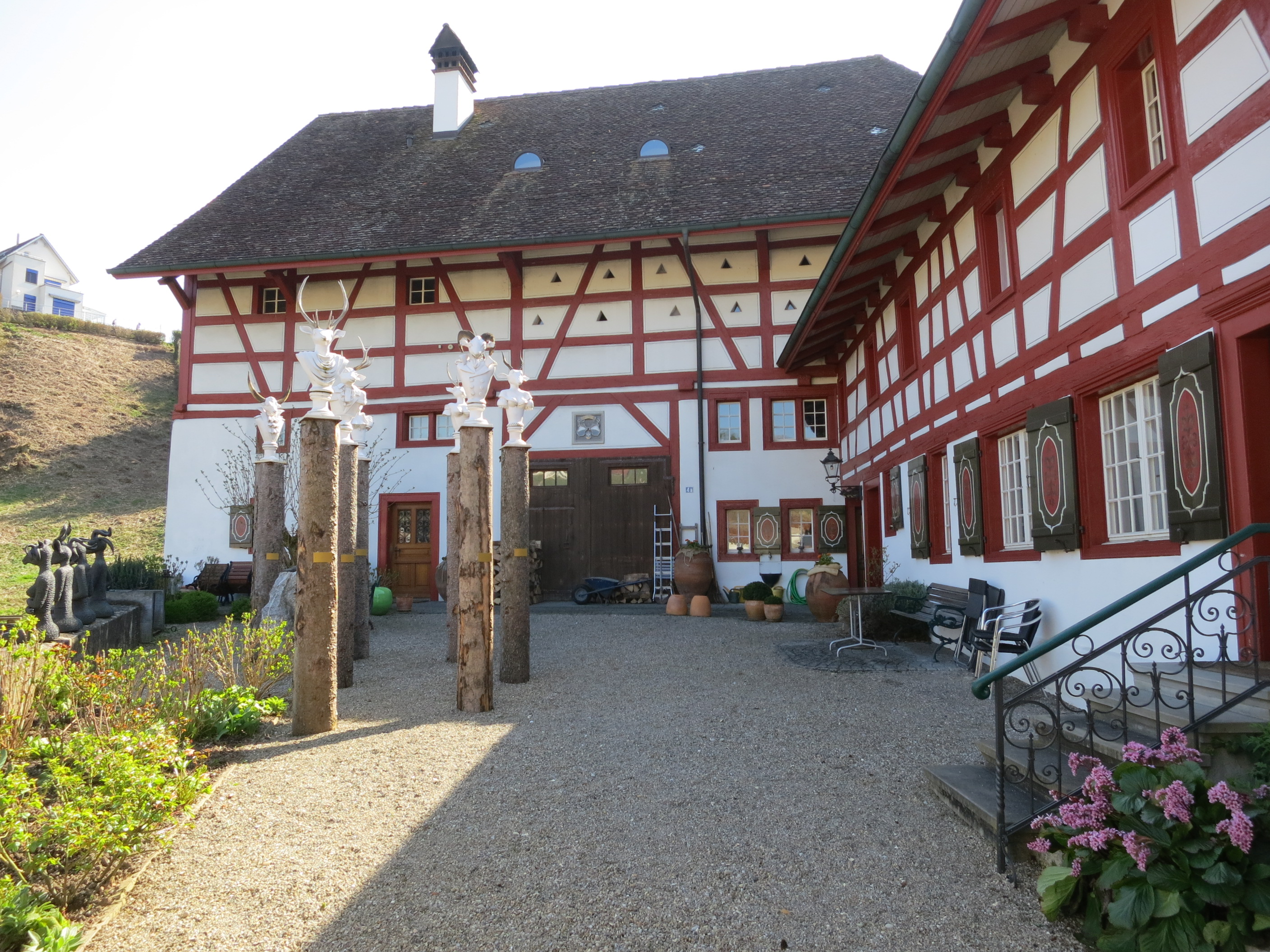 Wohnhaus, Eglisau ZH, Schweiz